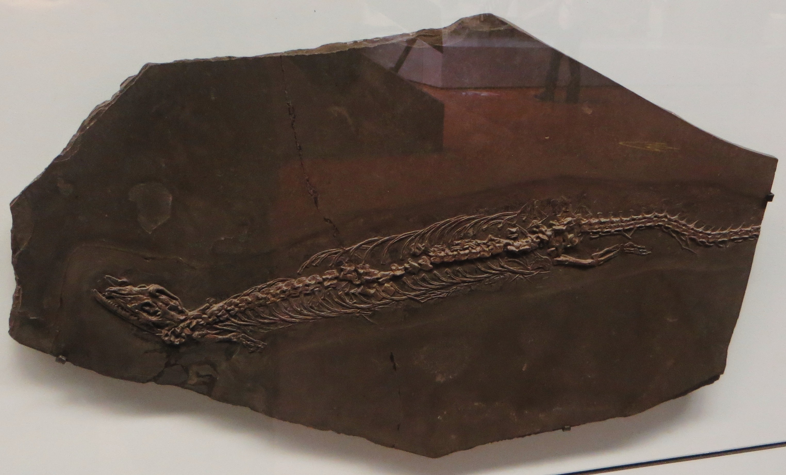 Fossil of Palaeopleurosaurus- Took the picture at Museum am Lowentor, Stuttgart